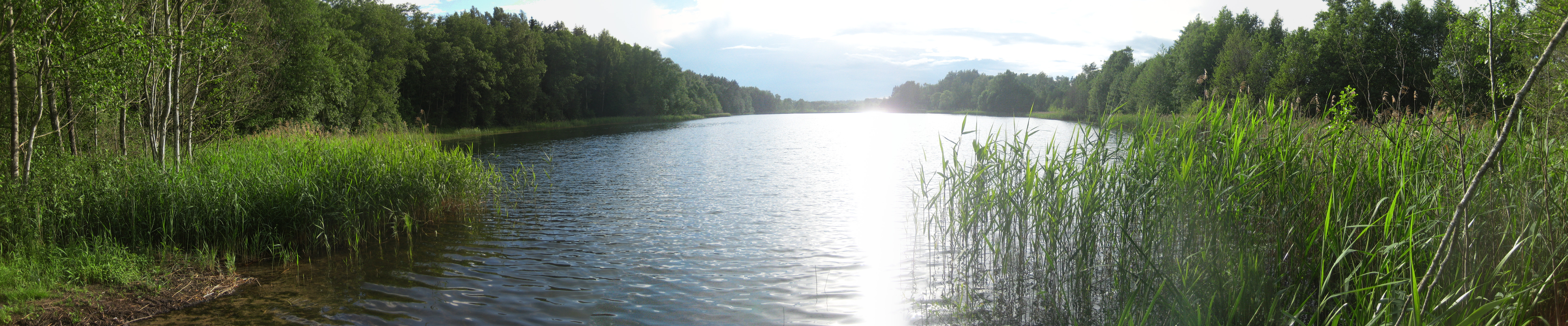 Degučių sen., Lithuania